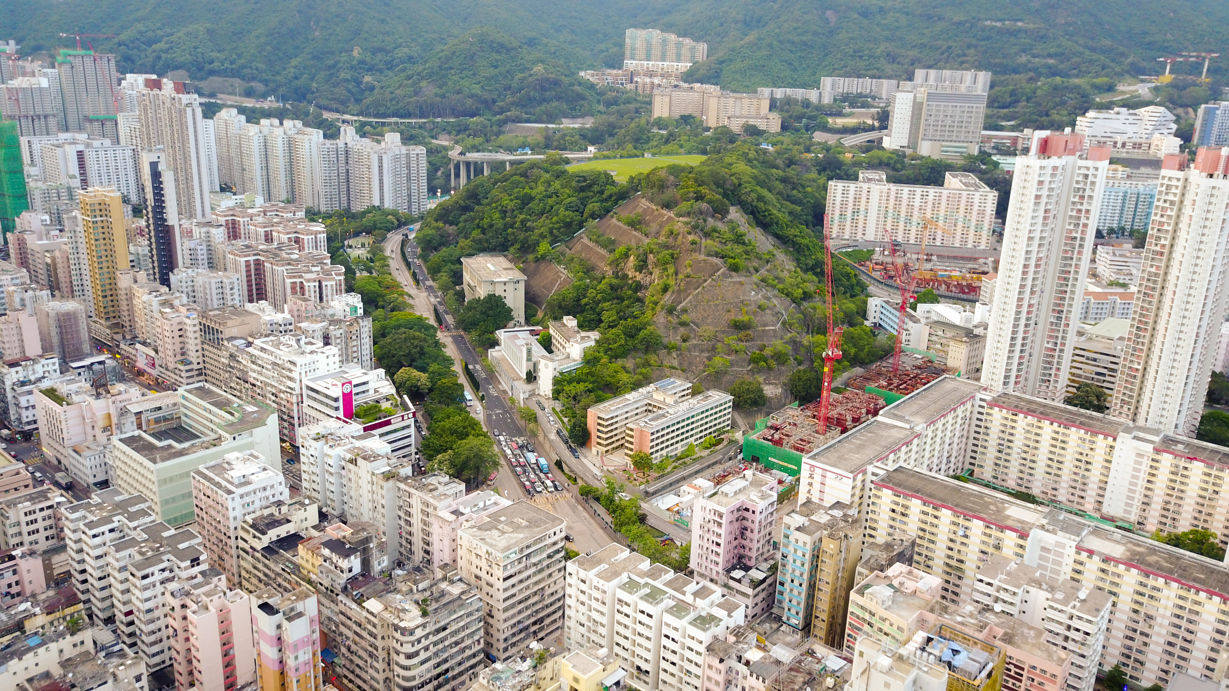 嘉頓山全貌